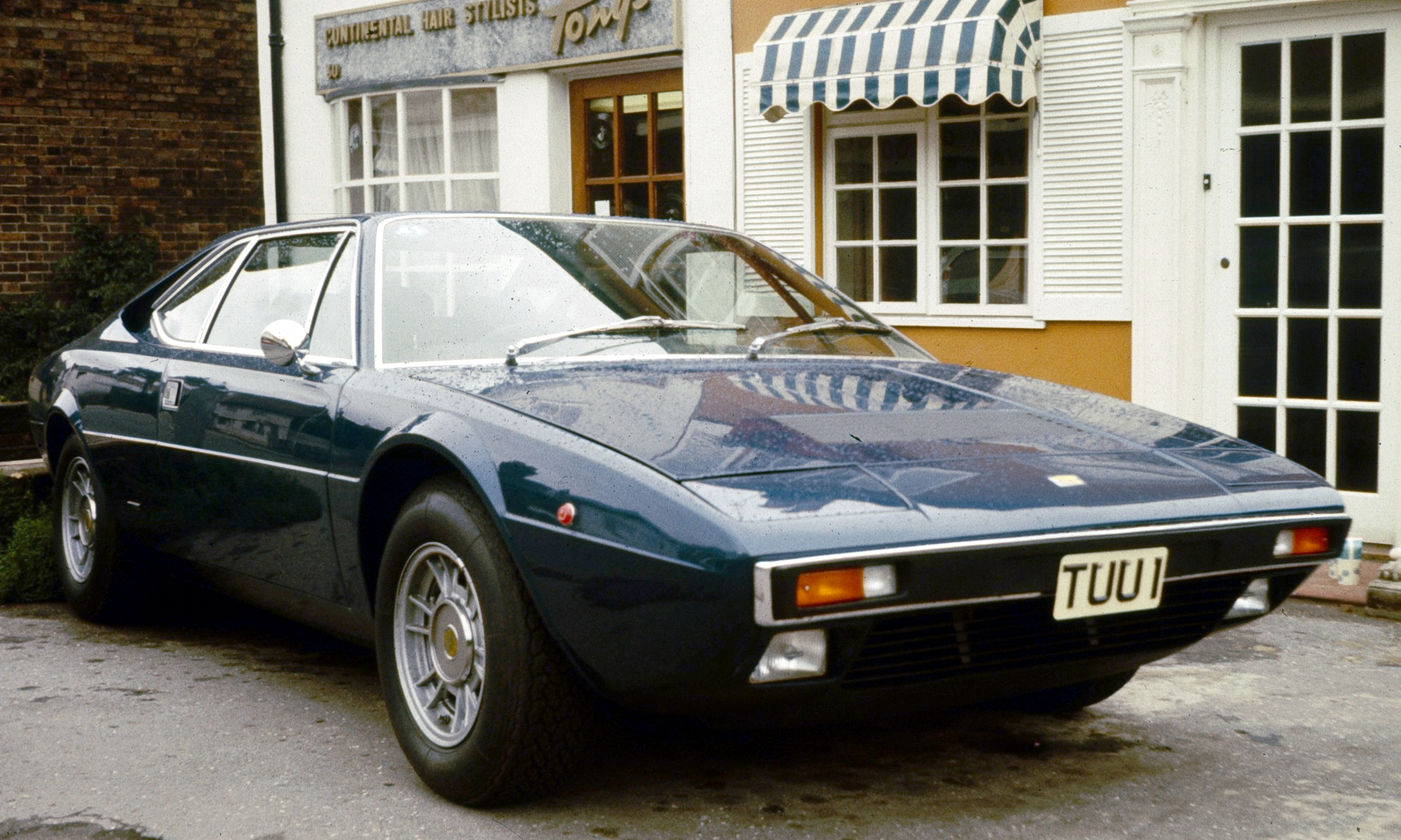 Ferrari Dino 308 Ongar